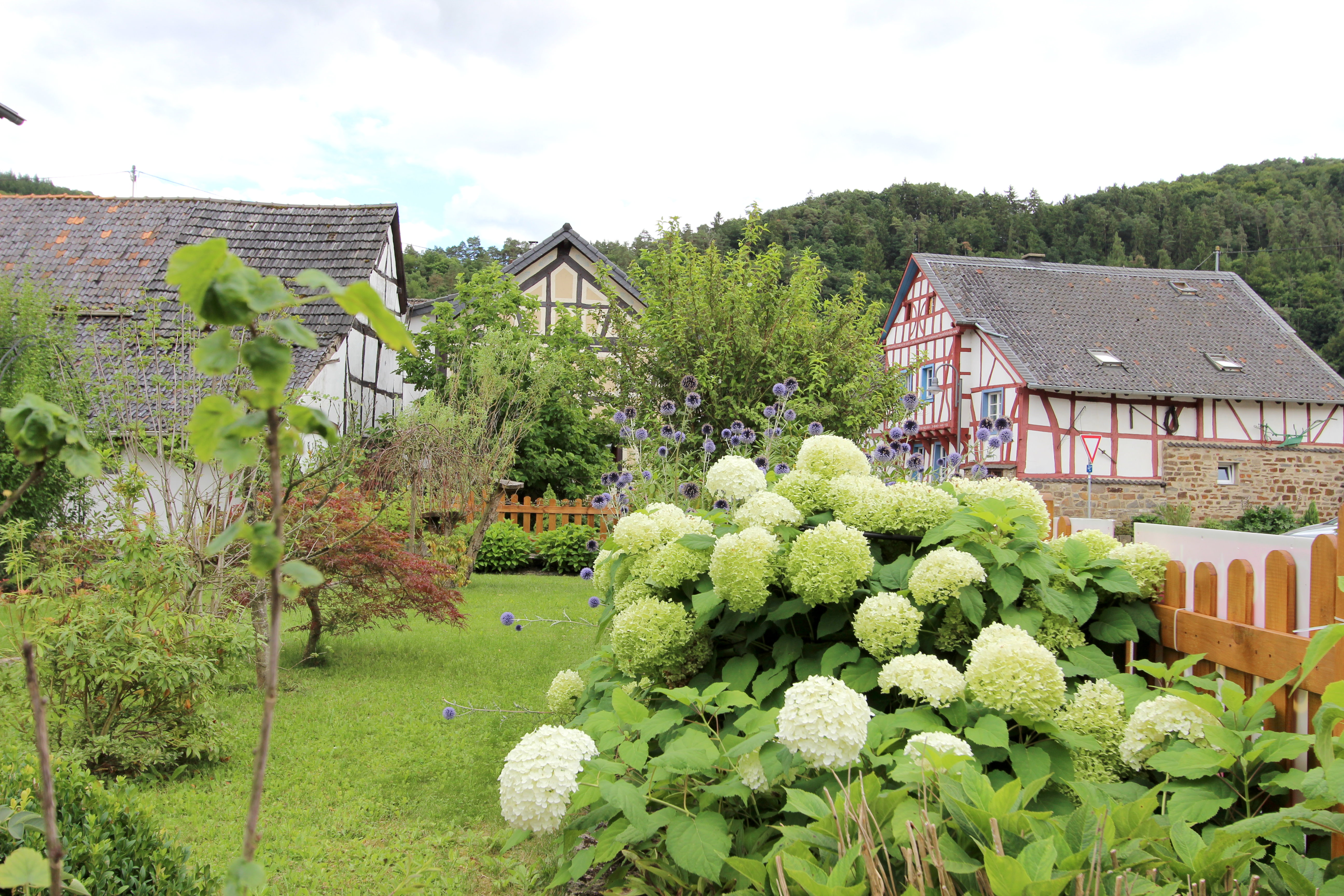 53520 Insul, Brückenstraße mit ehemaligem Zehnthof von 1616. Aufnahme von 2017.